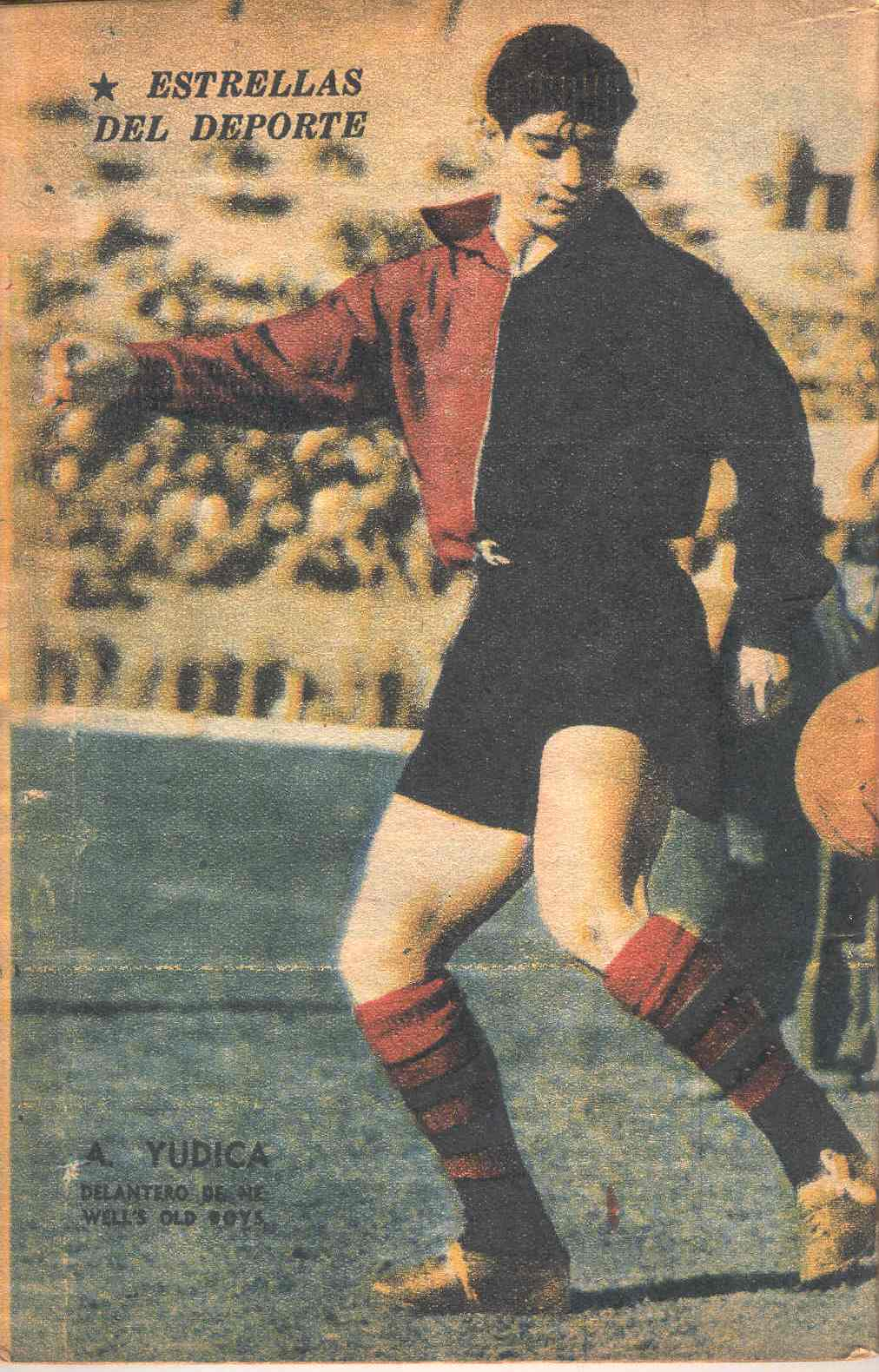 Estrellas del Deprote, José Yudica delantero de C. A. Newell's Old Boys. Revista PBT año 1954